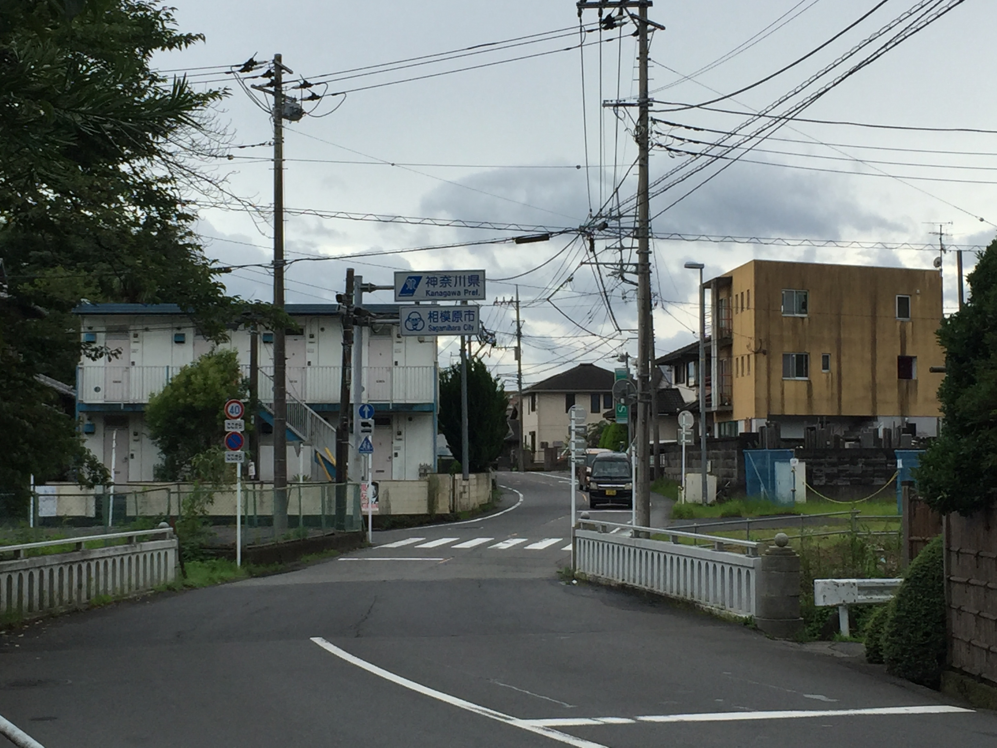 相原十字路交差点（町田市相原町）。都道506号線城山方面。境川に架かる二国橋を渡ると、神奈川県相模原市に入る。